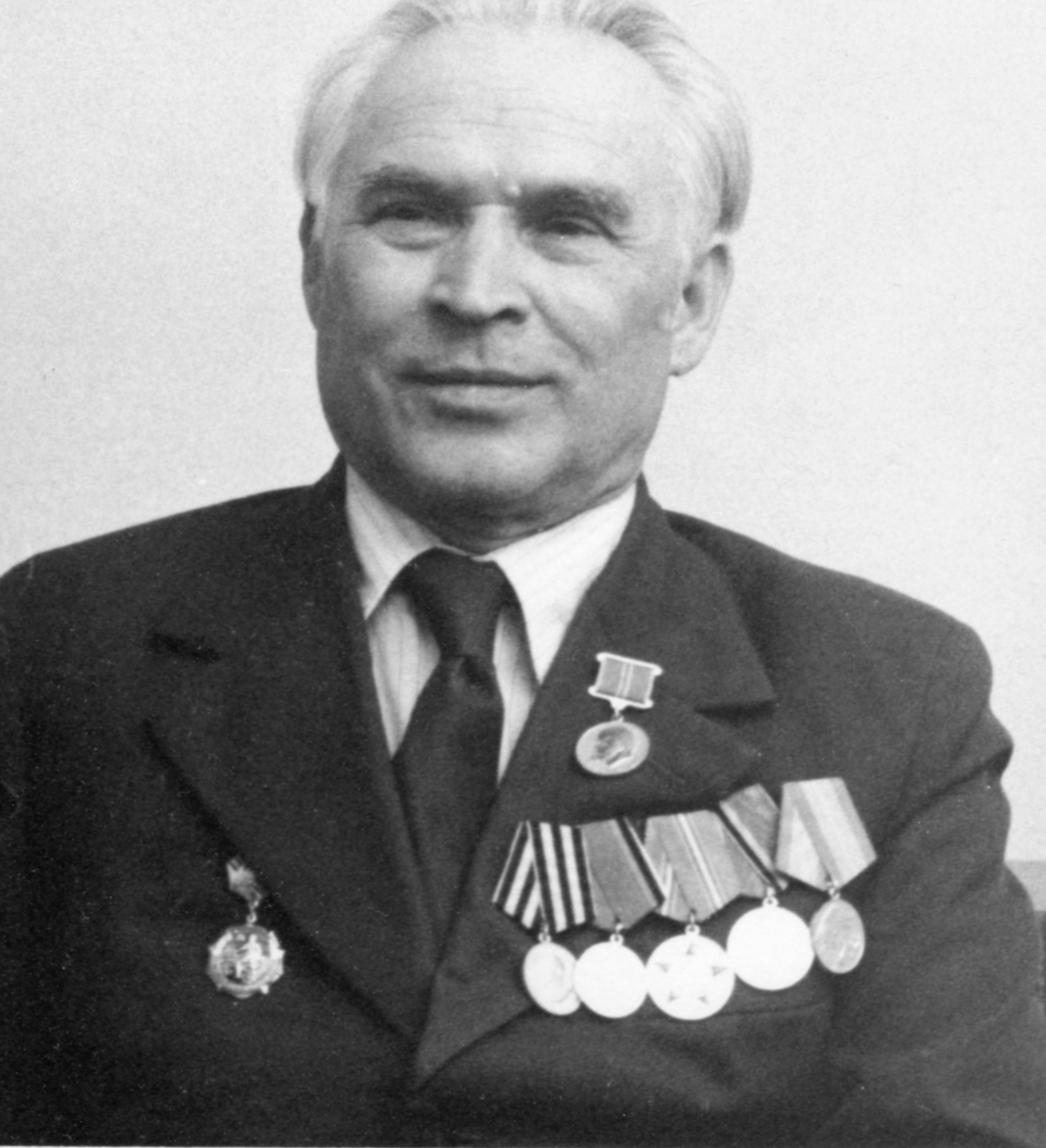 Михаил Фёдорович Власов